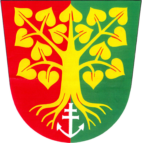 Znak obce Lipůvka